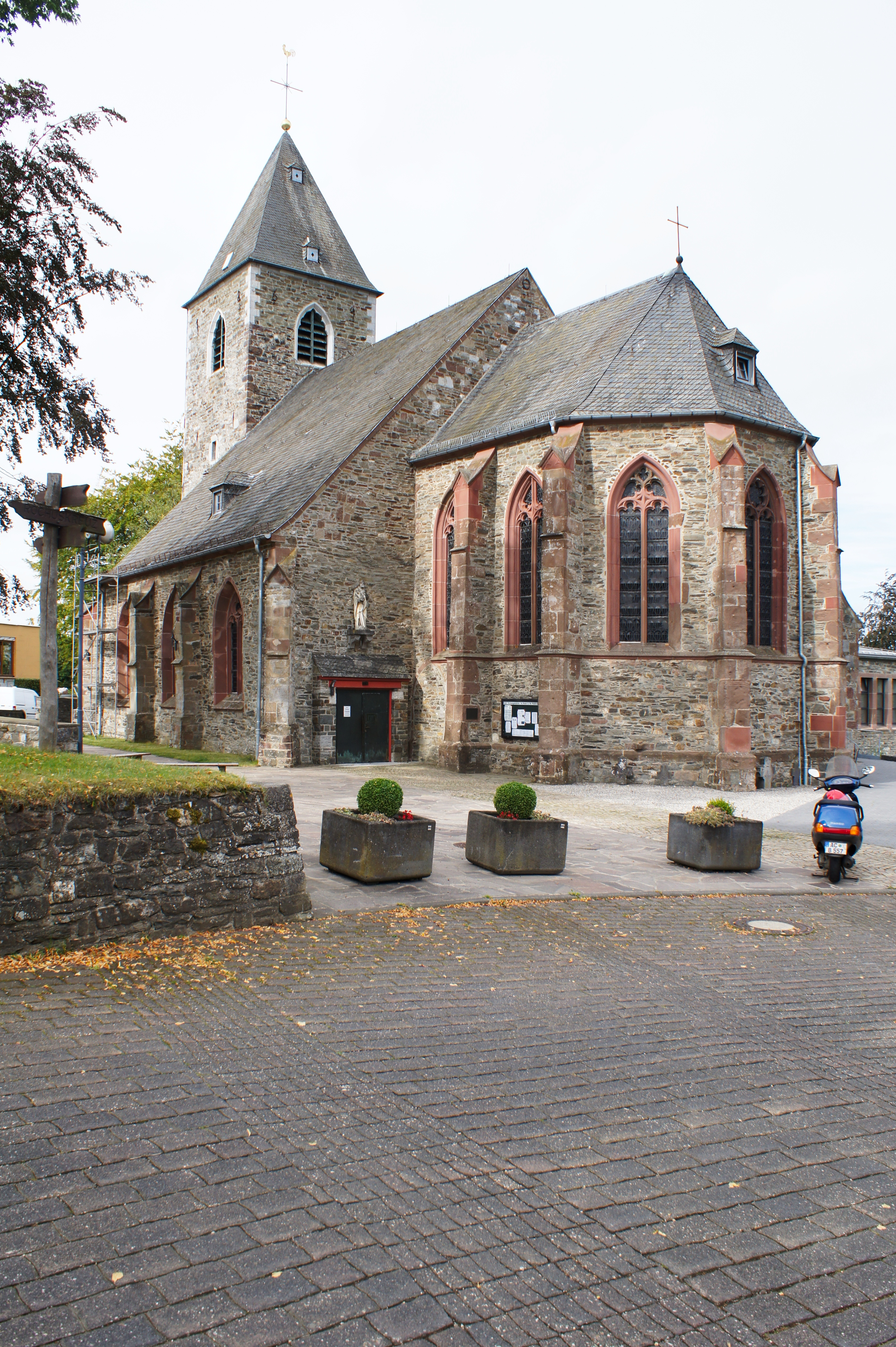 Konzen Katholische Pfarrkirche 2016This is a photograph of an architectural monument., no. 384